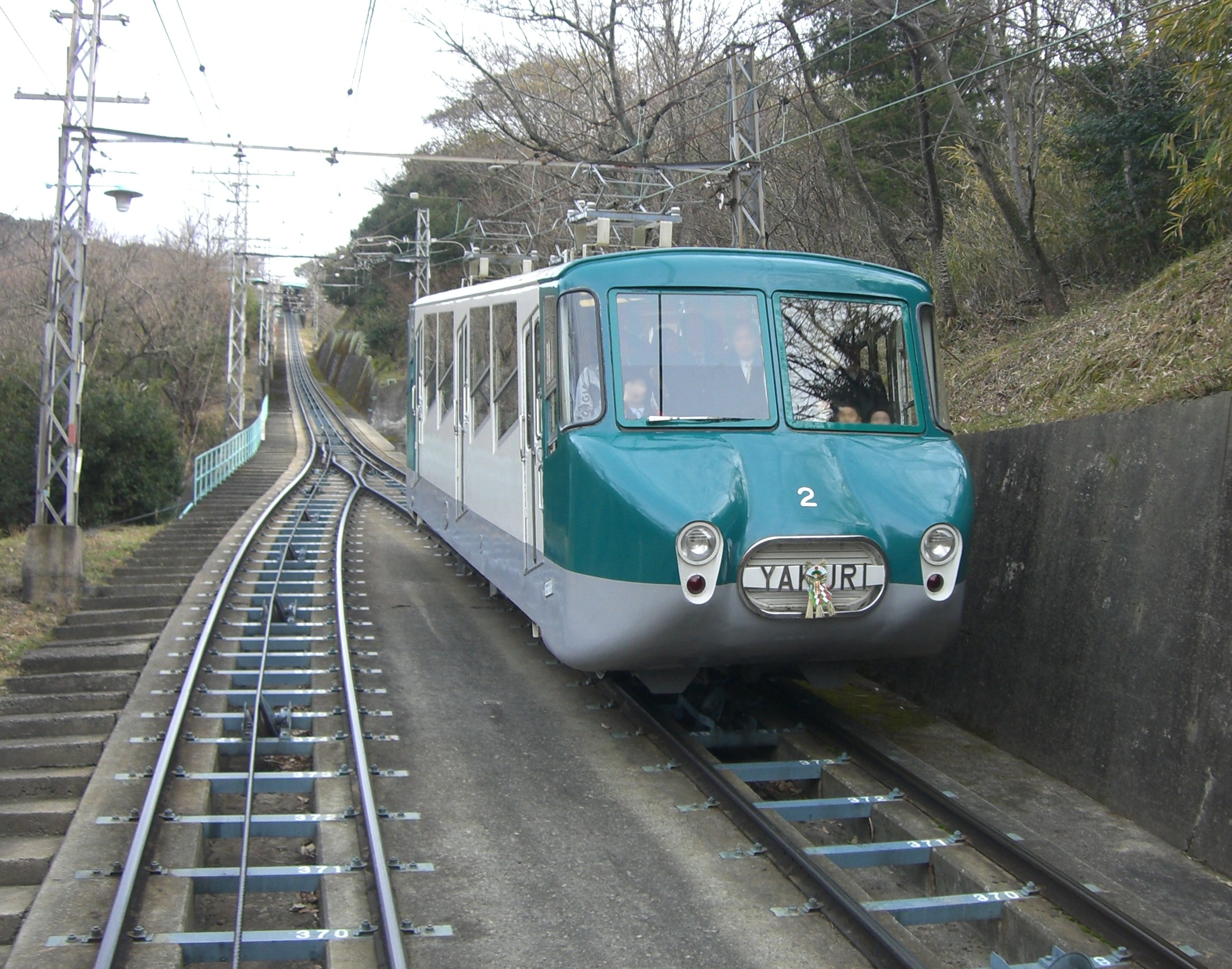 Yakuri Cable Car Railway